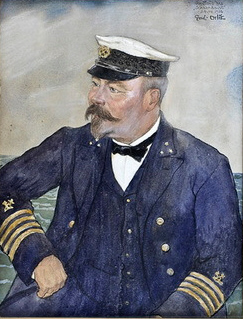 Portrait eines Kapitäns auf dem Reichspostdampfer Scharnhorst, Bleistift, Aquarell und Gouache auf Papier, bezeichnetAn Bord der Scharnhorst 20 VII. 1906; 29 x 22 cm